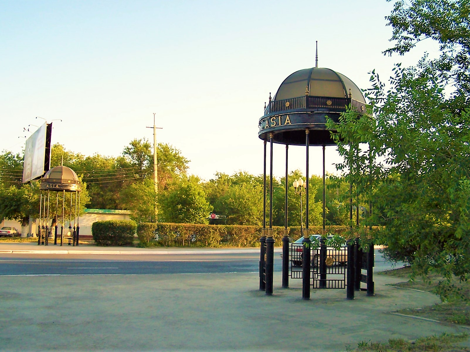 Atyrau, Kazakhstan